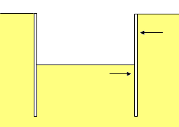 Plaatje van een bouwkuip met passieve gronddruk, getekend door Wikipediagebruiker: GeeKaa 24 aug 2005 09:34 (CEST)